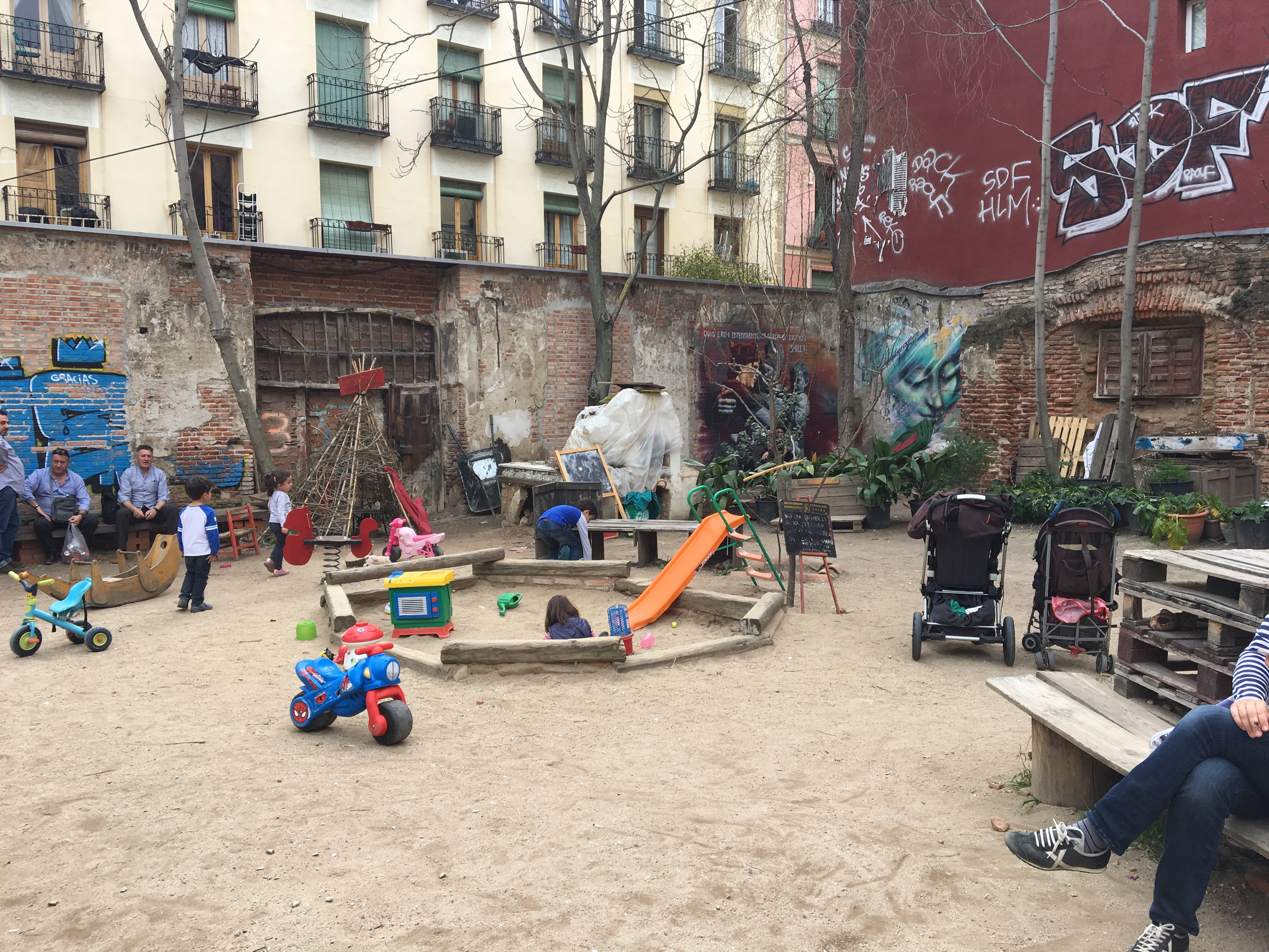 El jardin de los niños de Esta s una plaza